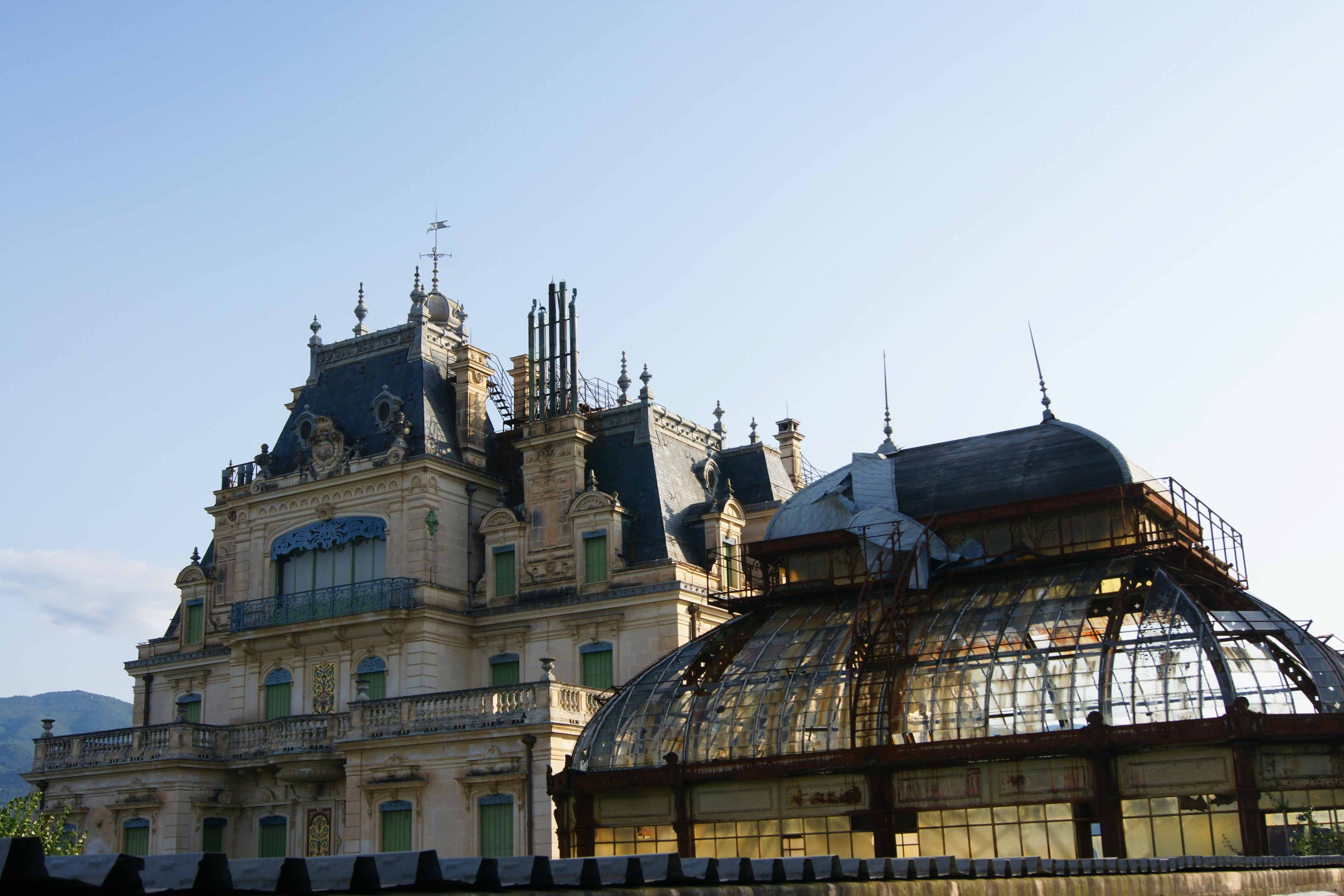 Vue de l'arrière du château et d'une des serres